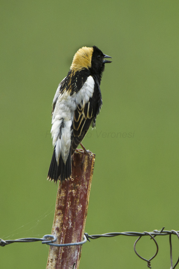 Bobolink - Malheur NWR - Oregon_S4E0082